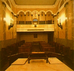 Interno della Sinagoga di Parma.